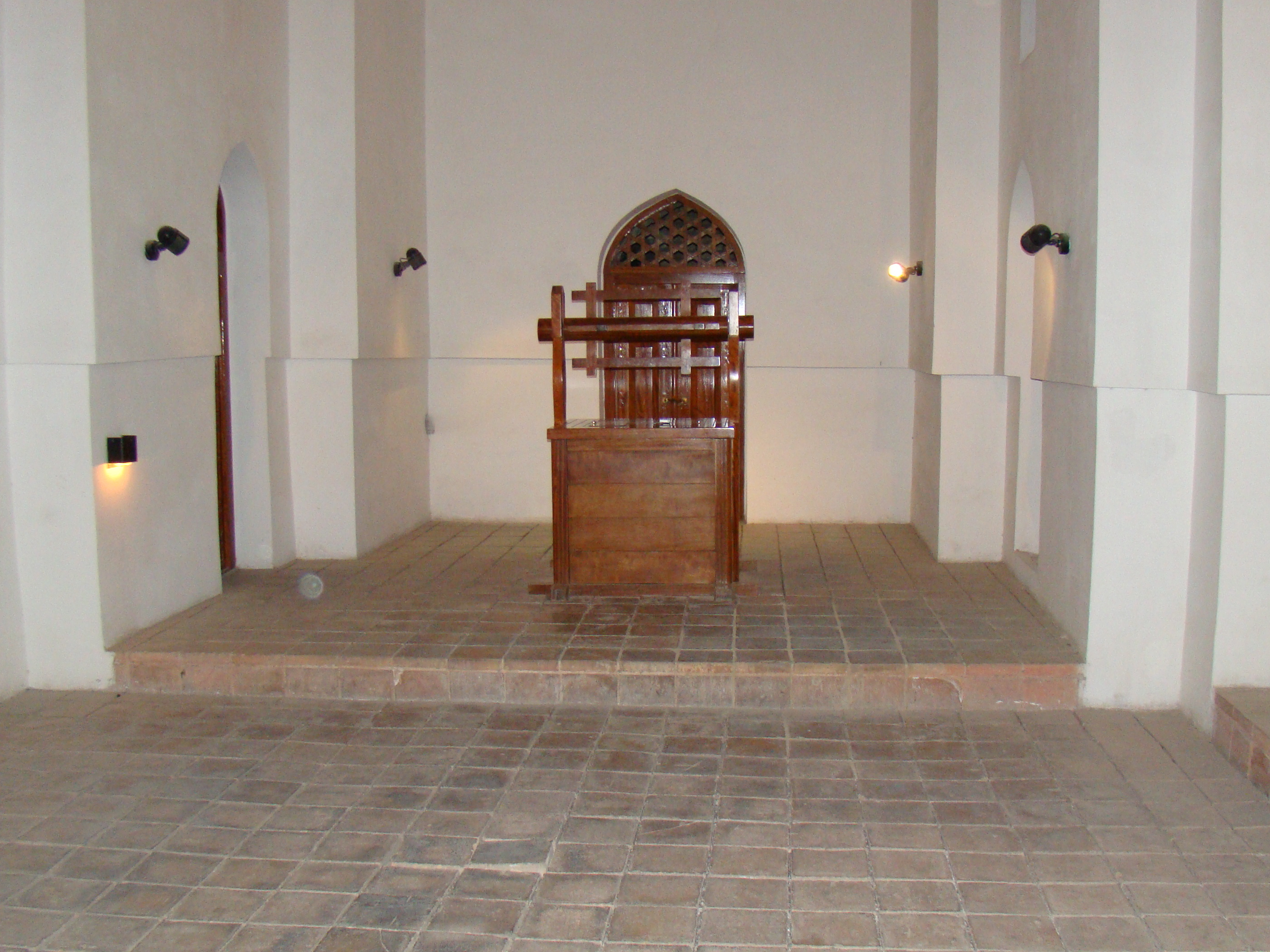 Комплекс Ахмеда Ясави в городе Туркестан, Южно-Казахстанская область. Колодец, кудукхана.